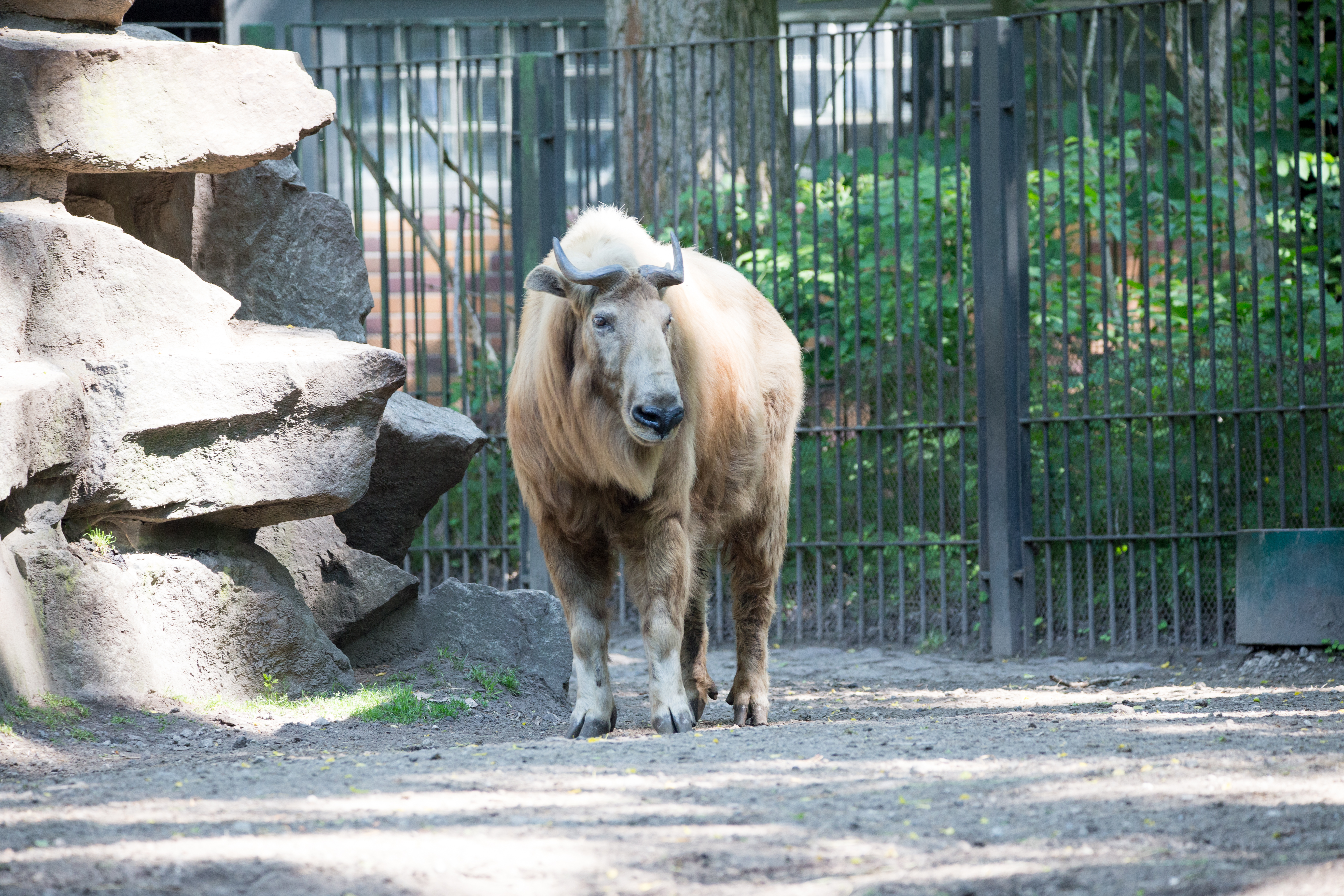 Goldtakin Budorcas taxicolor bedfordi